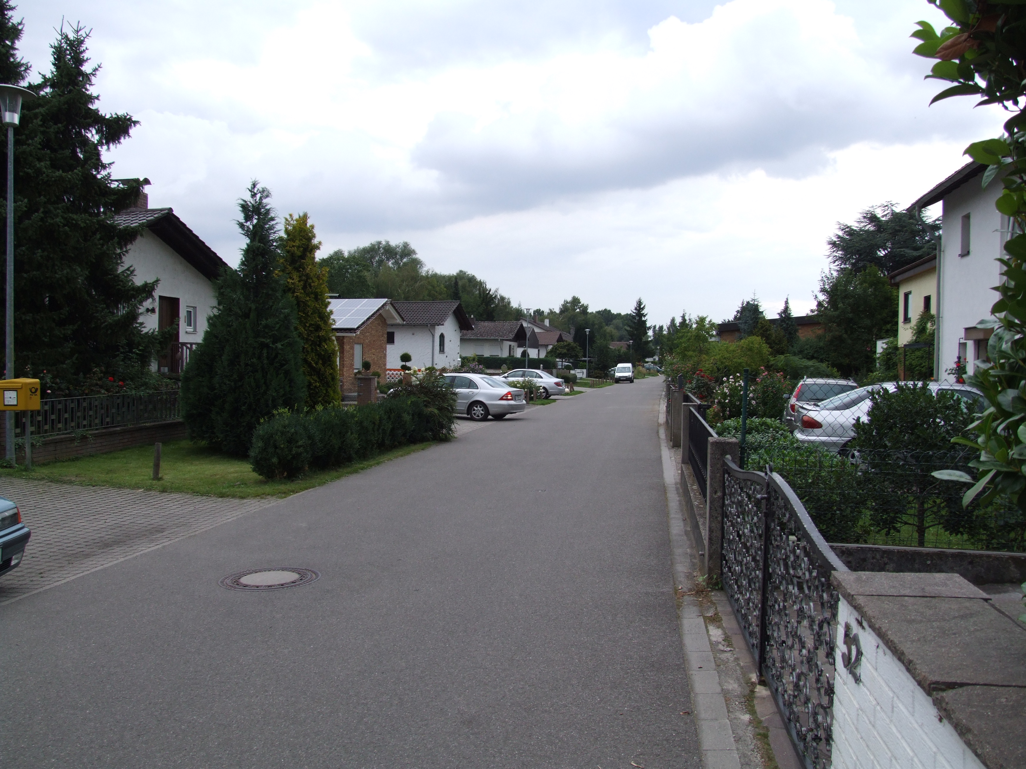 Teilstück der Straße Binsfeld zwischen Sonnensee und Speyerlachsee ab Höhe Briefkasten